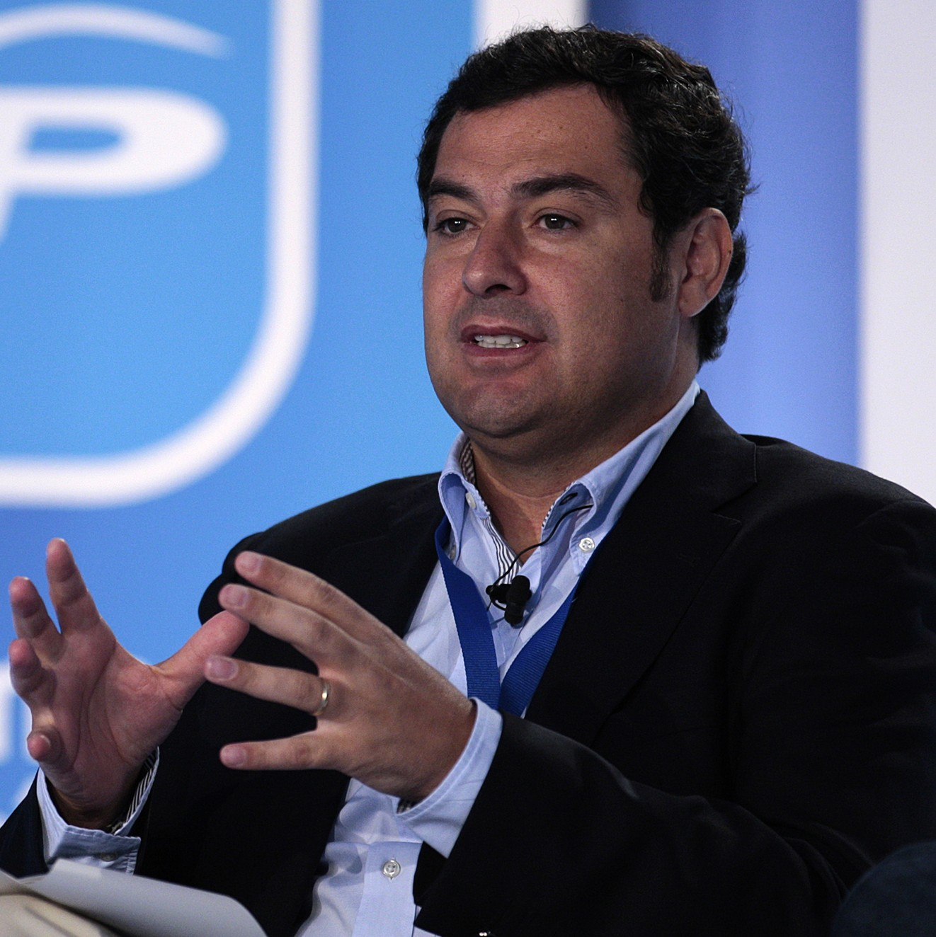 Juan Manuel Moreno, candidato del PP a las elecciones al Parlamento de Andalucía de 2015